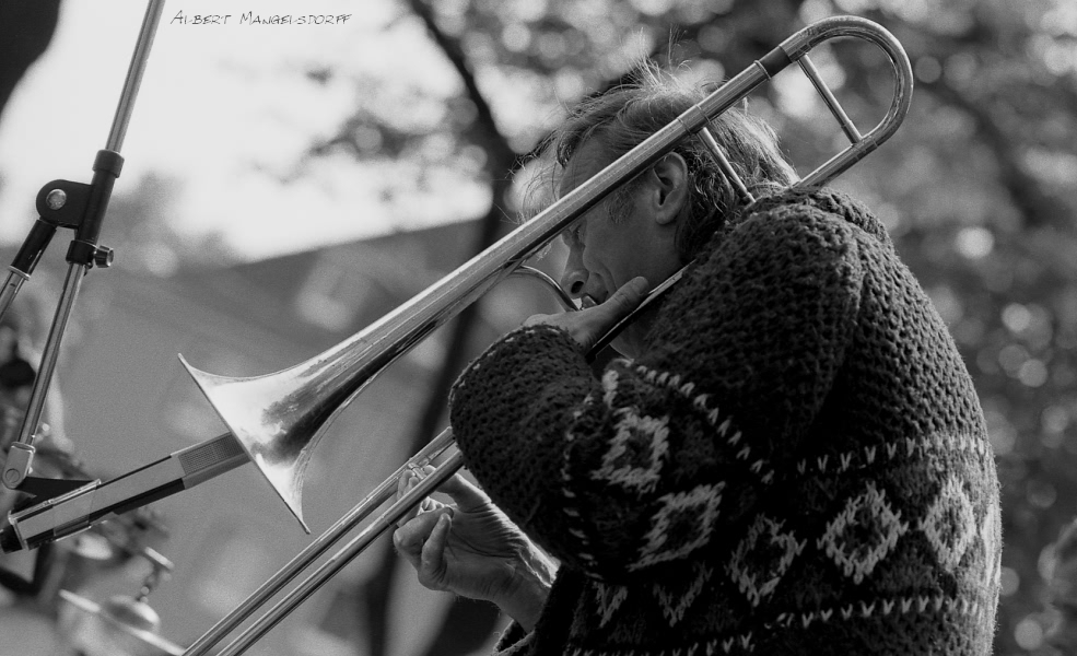 Albert Mangelsdorff, Globe Unity Ochestra, Open Air Konzert in Wuppertal (Laurentiusplatz), 1970-er Jahre